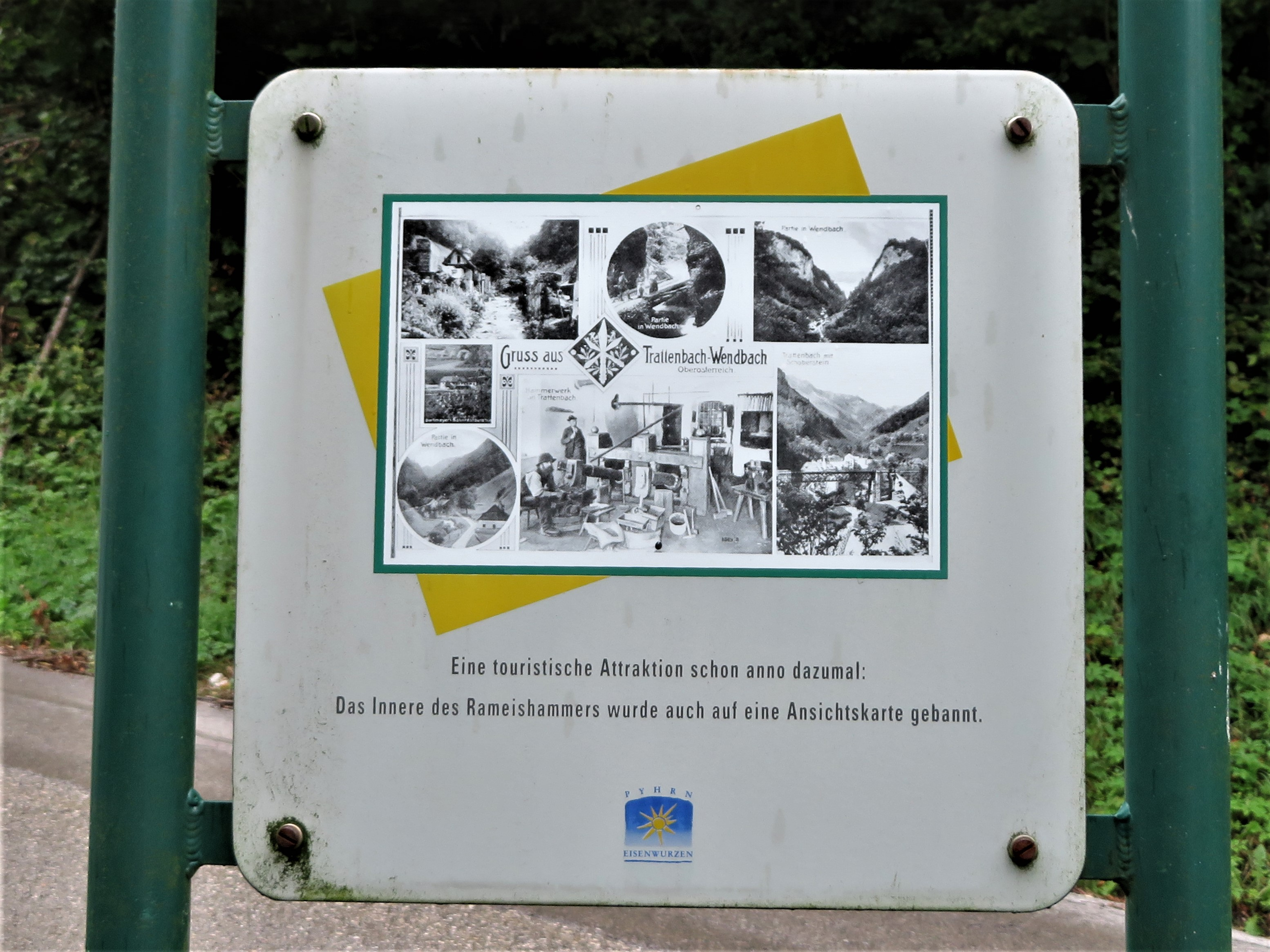 Unterer Teil der Informationstafel beim Rameishammer, Trattenbach, Oberösterreich.